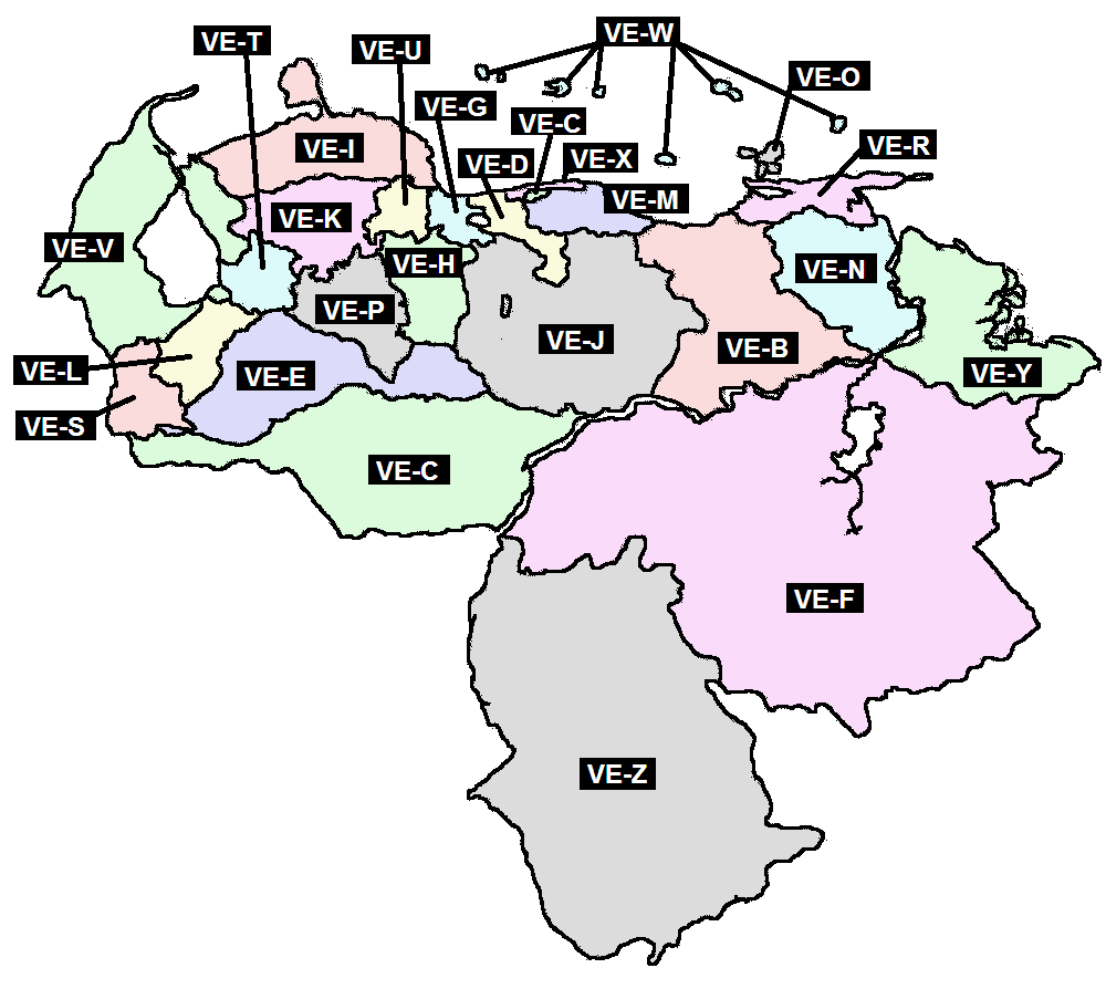 Венесуэла административное деление 256 цветов